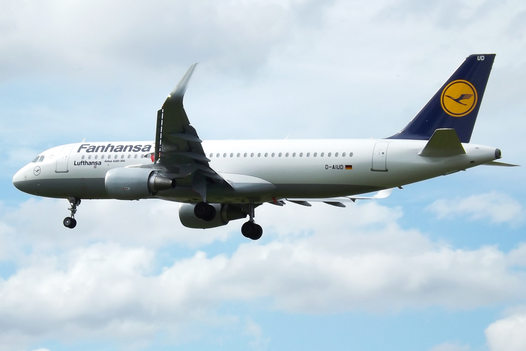 D-AIUD A320 Lufthansa "Fanhansa"